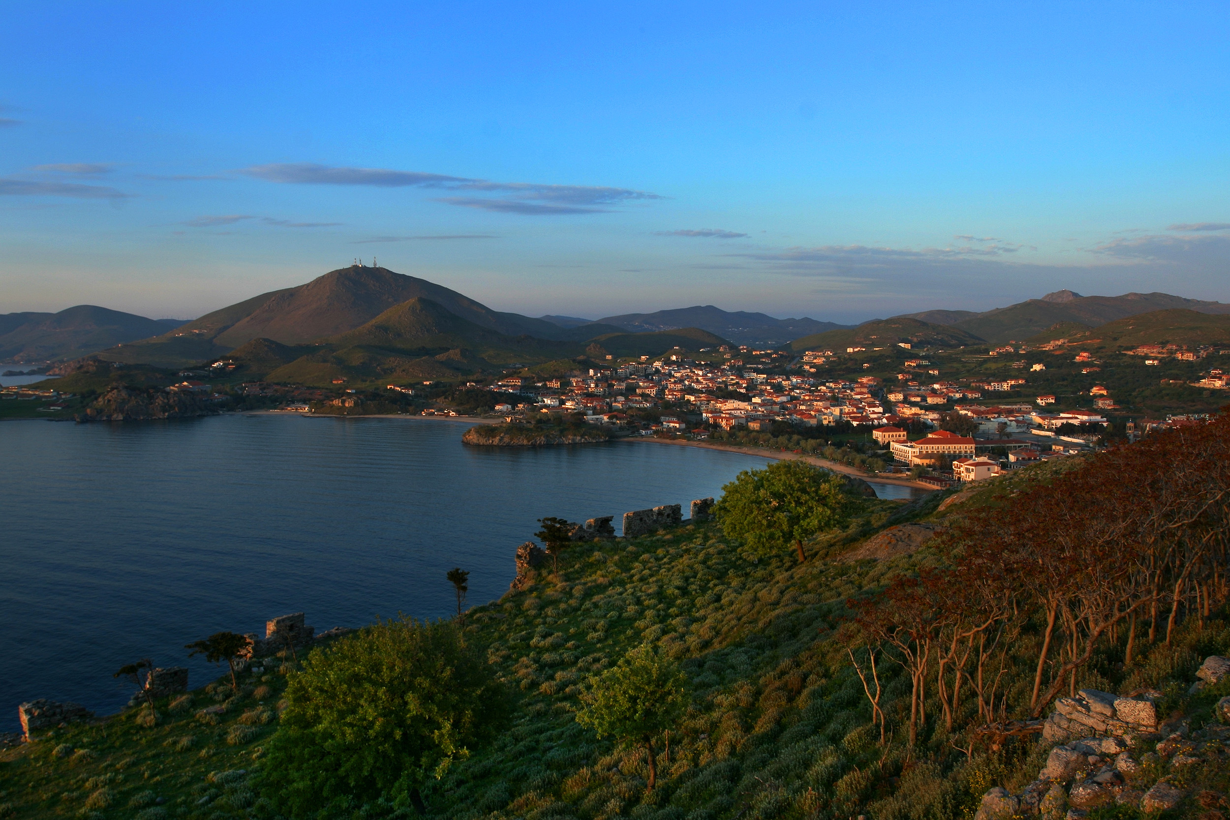 Κάστρο Μύρινας«Κάστρο Μύρινας»